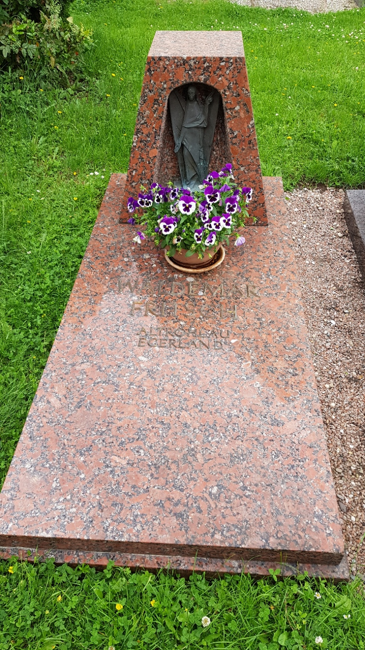 Liegegrab von 1978 des Bildhauers Waldemar Fritsch auf dem Friedhof in Ansbach-Eyb östlich der Lambertuskirche.